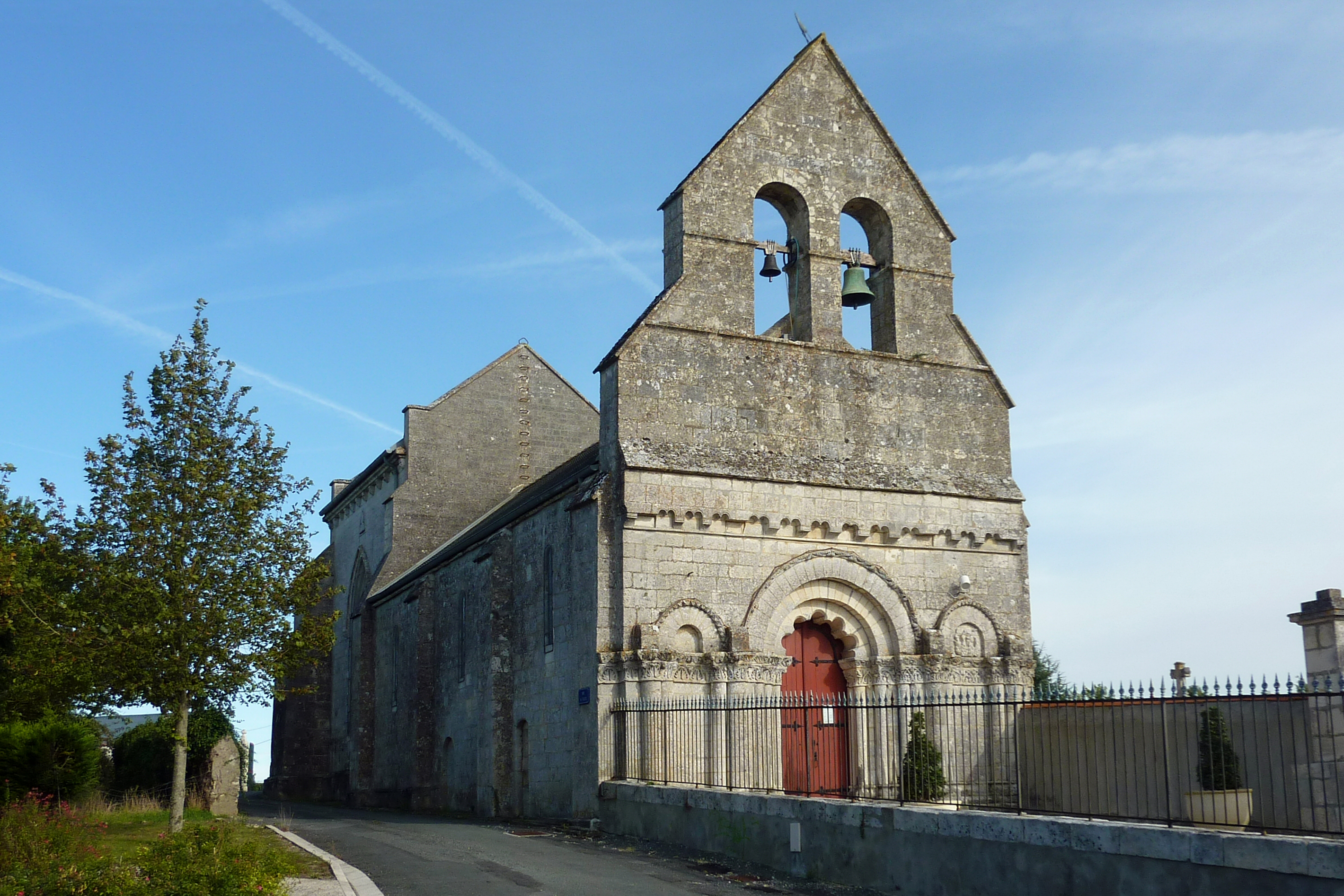 Église Saint-Clément Cabariot Charente-Maritime France